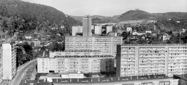 Suhl, Aue II, Wohnblocks ADN-ZB Schaar 22.10.1979 Suhl: Blick auf die Bezirksstadt Suhl mit dem Neubaugebiet Aue II im Vordergrund. (zweiteiliges Panorama)